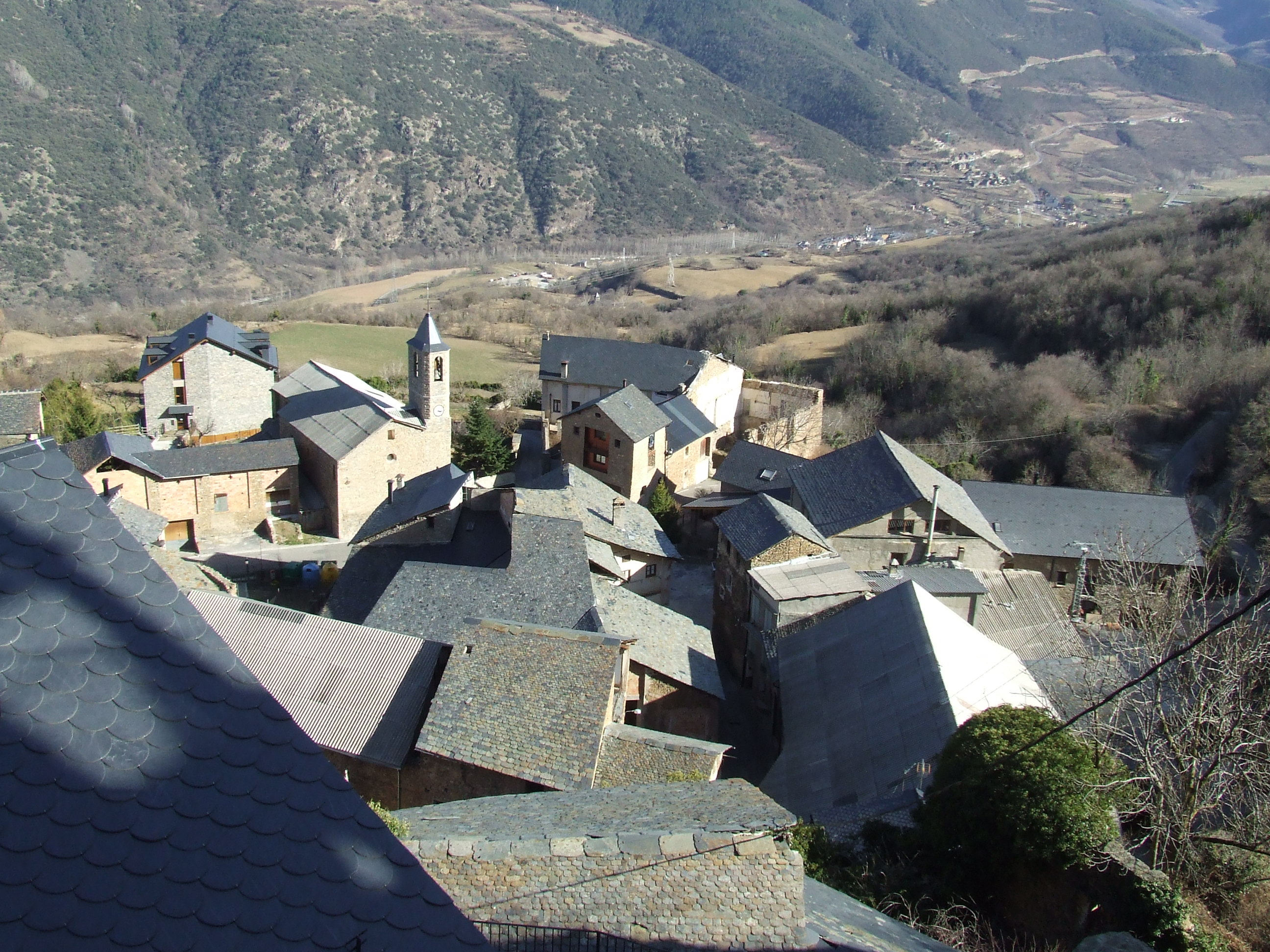 Olp (Enviny, Sort, Pallars Sobirà)